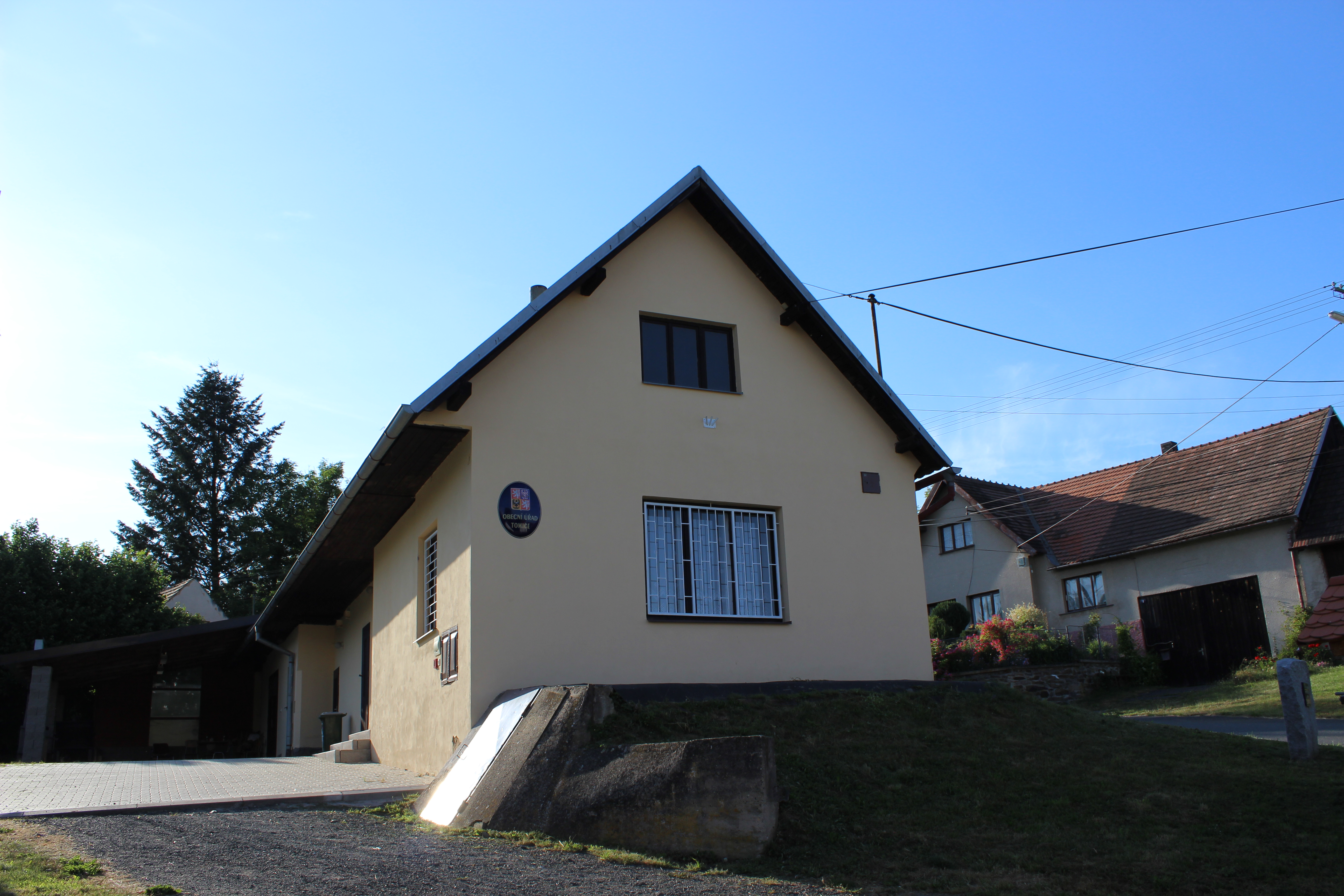 Obecní úřad (dům číslo popisné 32) v obci Tomice (pohled od jihovýchodu).